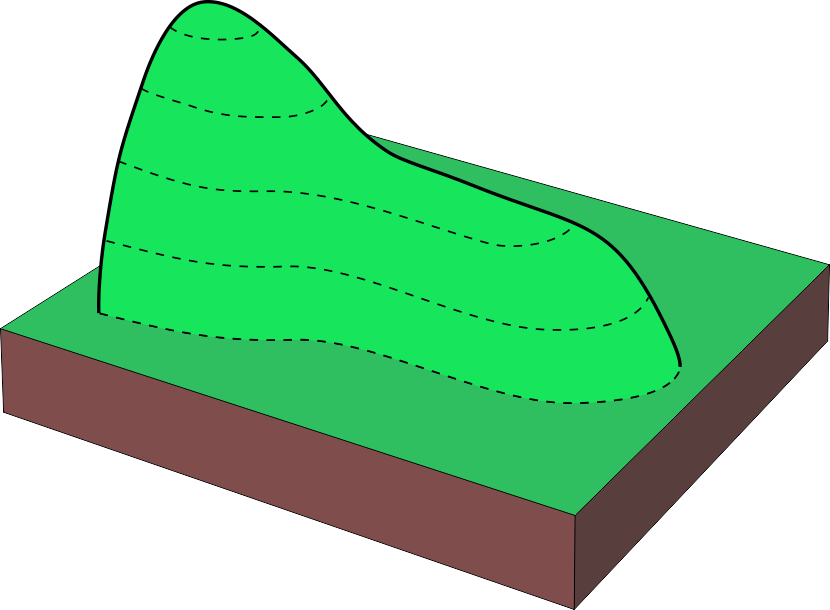 Spočinek